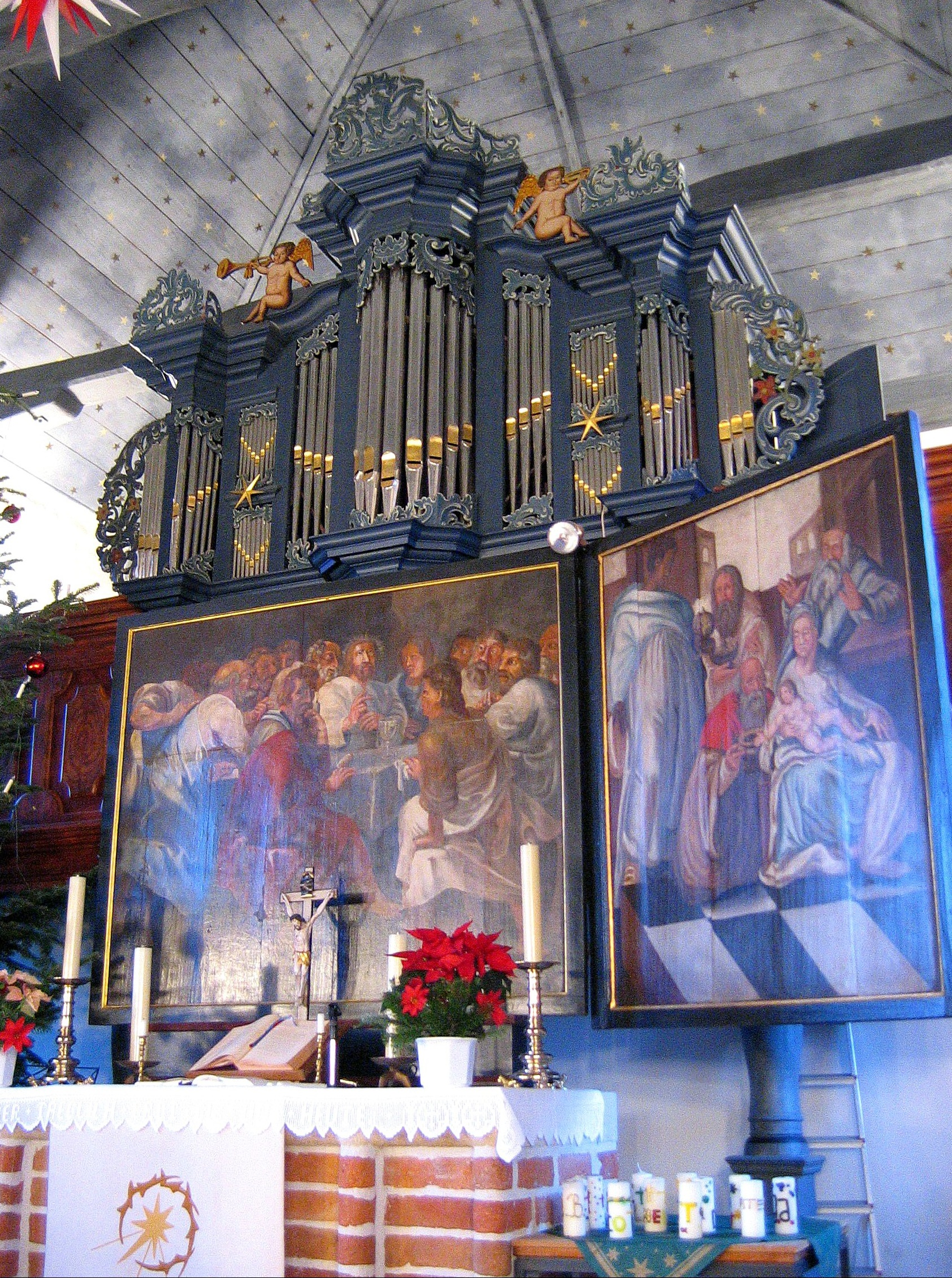 Orgel in Nortmoor, Landkreis Leer